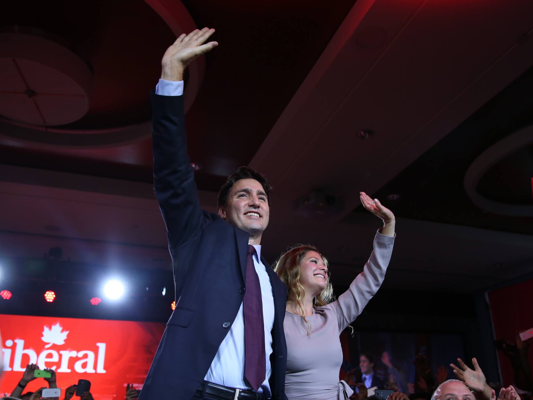 Prime Minister Justin Trudeau and wife Sophie